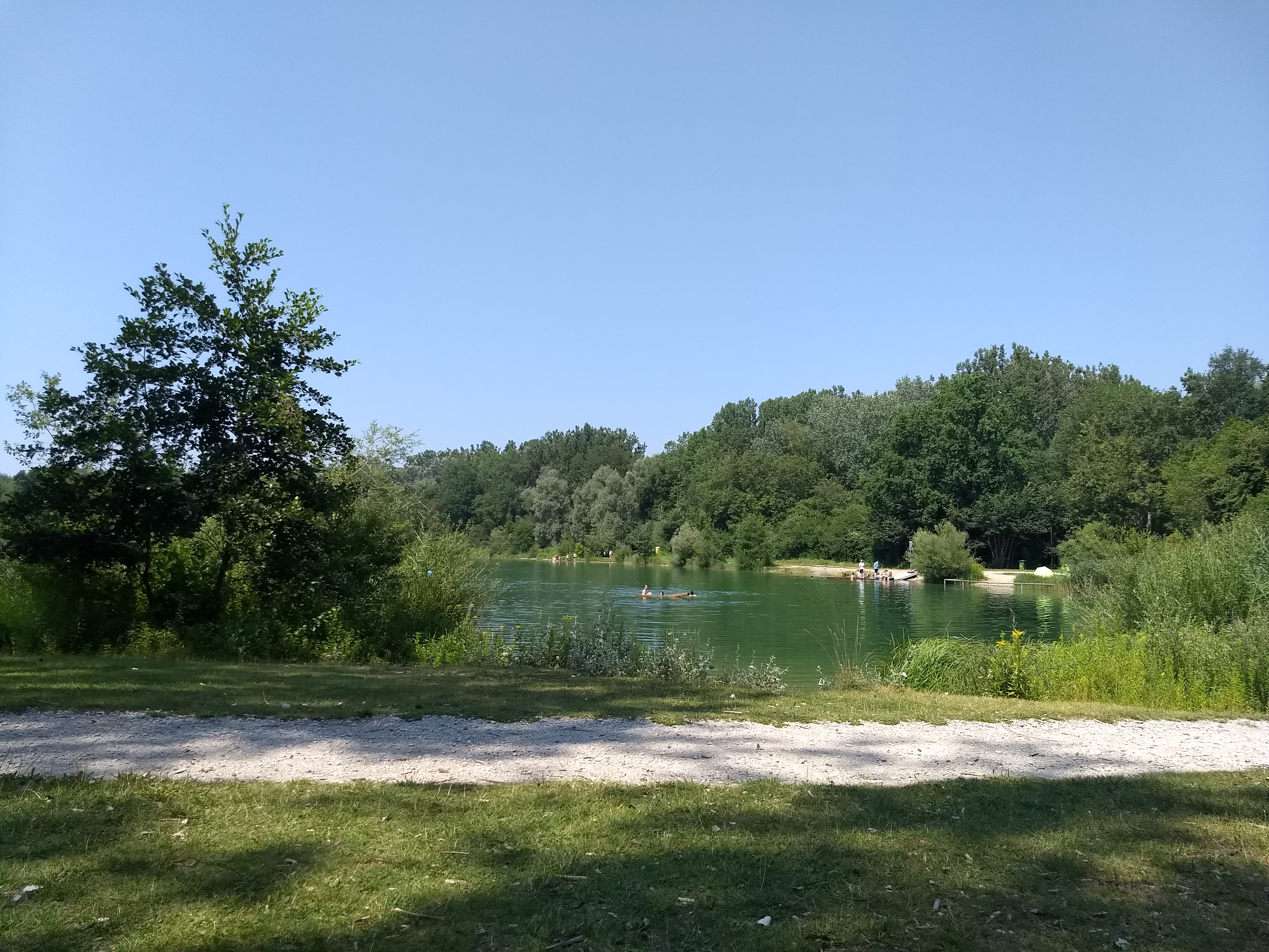 Foto des Nordufers des Schafirrsees mit Badegästen von der Liegefläche am Nordostufer aus fotografiert